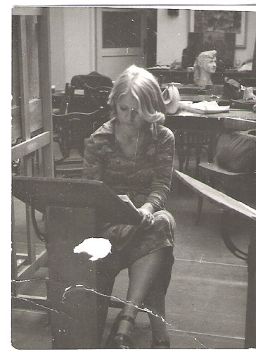 Šedesátá léta, Jarmila Krynická, plzeňská malířka